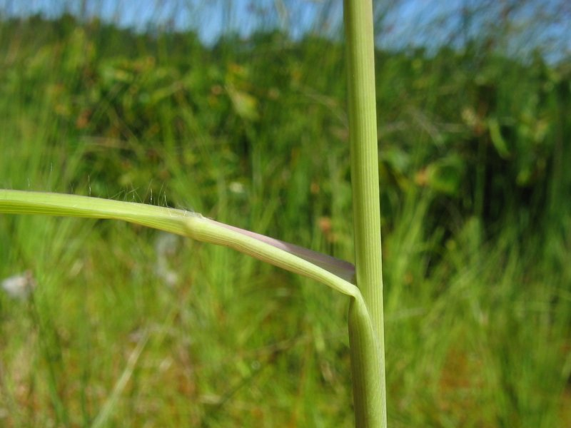 Gewöhnliches Pfeifengras (Molinia caerulea), Blatt